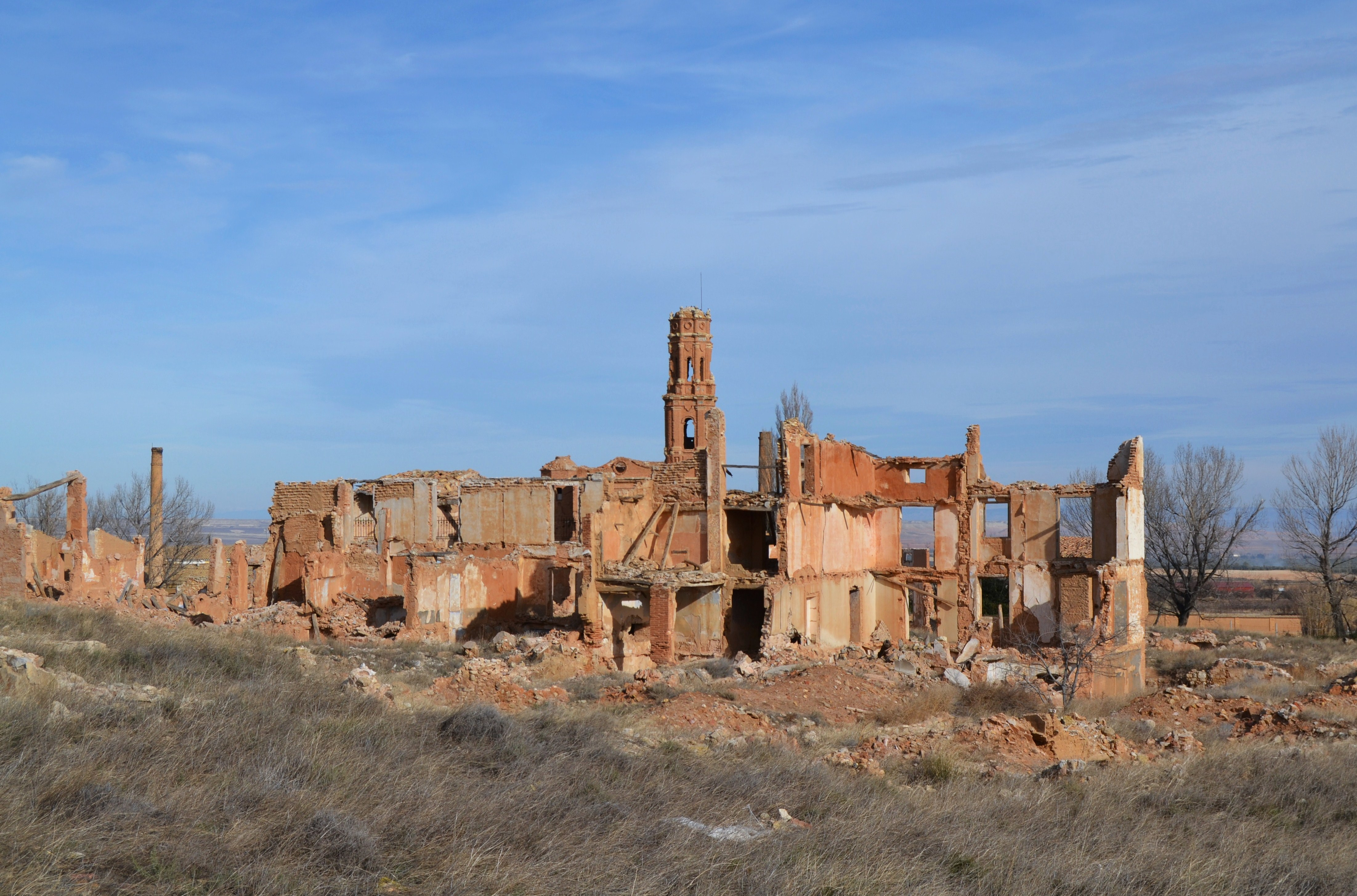 Aragó, vista del poble vell de Belchite.